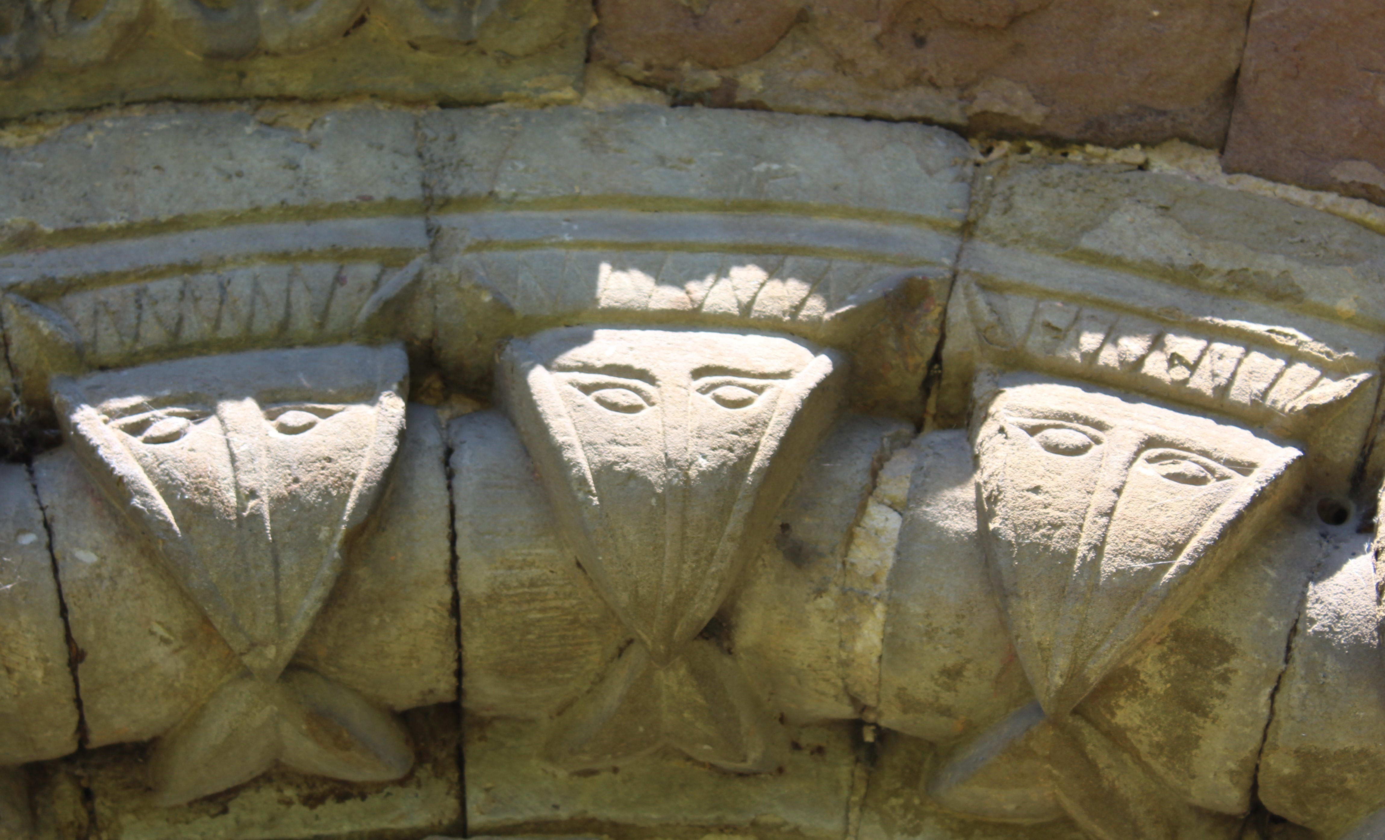 Detalle cabezas rozadas o picudas en el arco del pórtico sur.